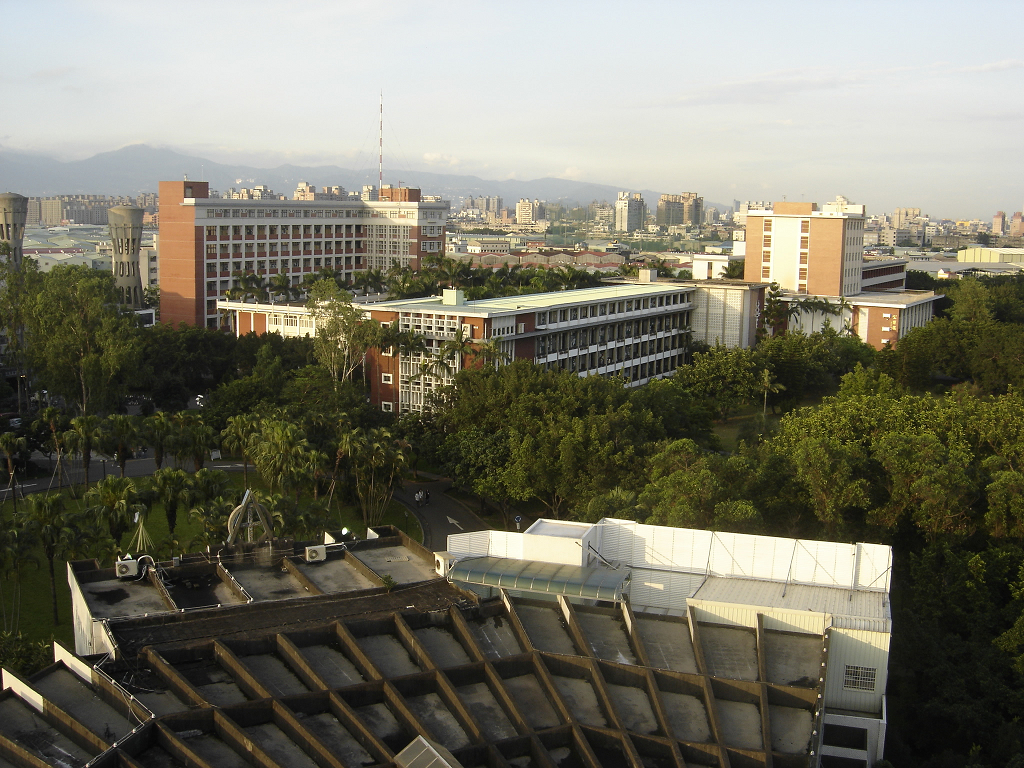 輔大文學院